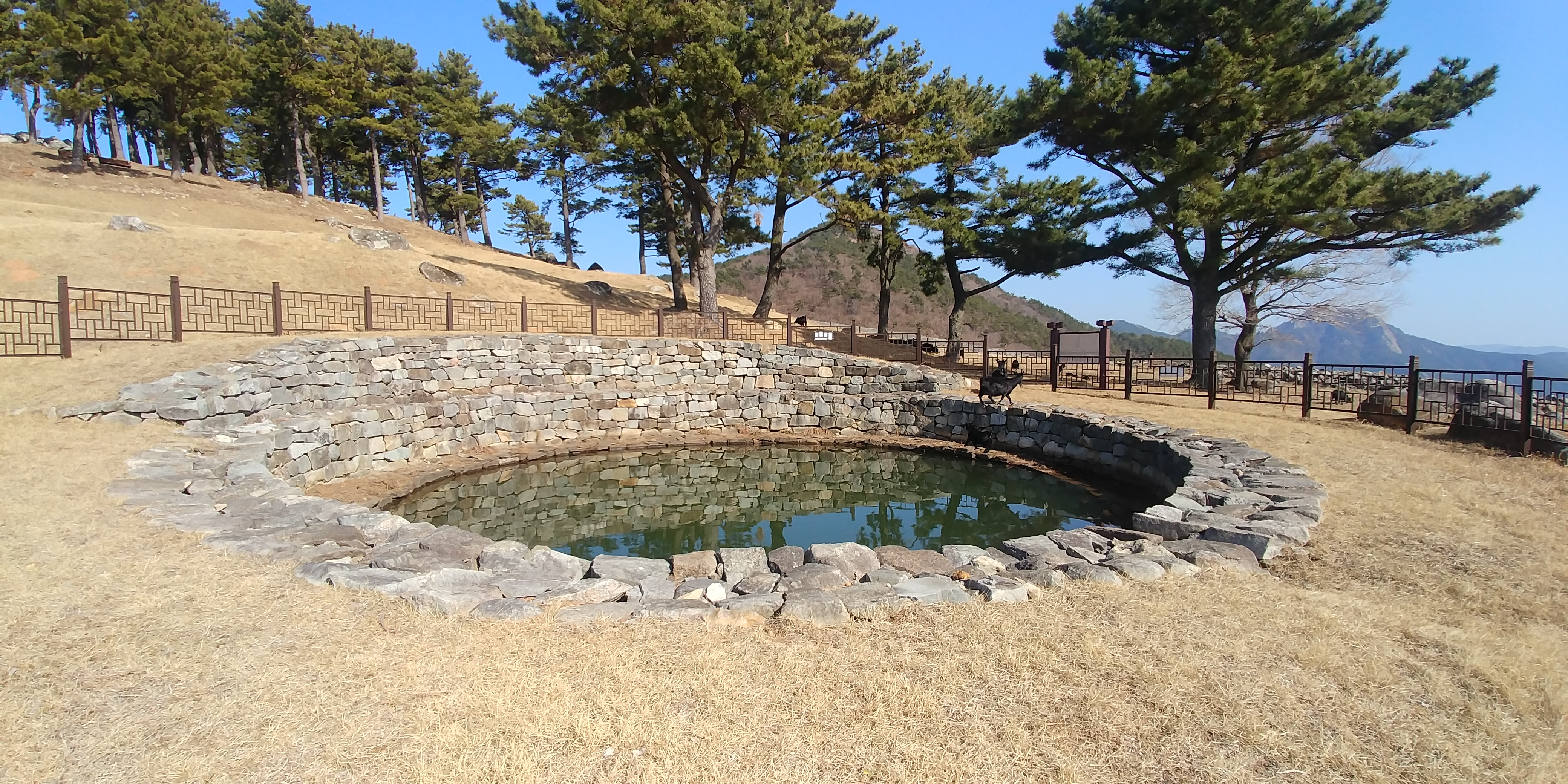 둔덕기성 집수지